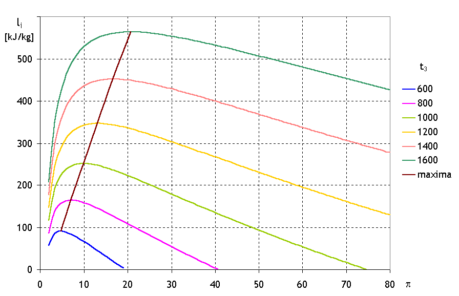 Przykładowa zależność wewnętrznej mocy jednostkowej (mocy mechanicznej otrzymywanej w wirniku odniesionej do jednostki strumienia masy powietrza na wlocie do układu) od sprężu п dla różnych temperatur gazu na wlocie do turbiny (wylocie z komory spalania) t3. Zwrócona jest tu uwaga na przebieg maksimów poszczegónych krzywych. Dla każdej temperatury t3 występuje pewne maksimum mocy jednostkowej, a jego położenie odpowiada większym sprężom dla rosnących temperatur t3.